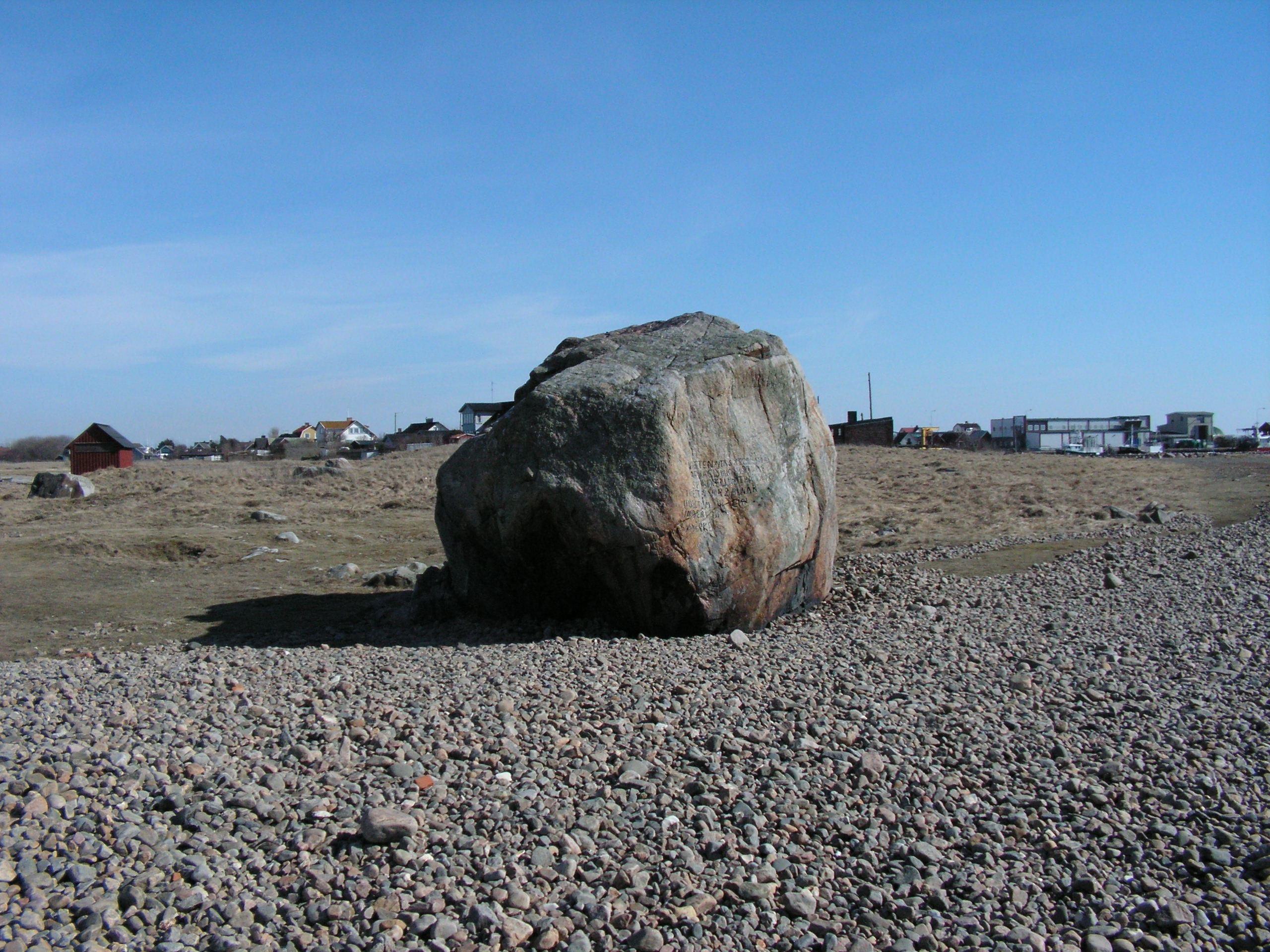 Glomstenen eller Glumsten är ett flyttblock vid Glommens hamn i Morups socken, Falkenbergs kommun, Halland, Hallands län, Sverige. Flyttblocket har en inskription.